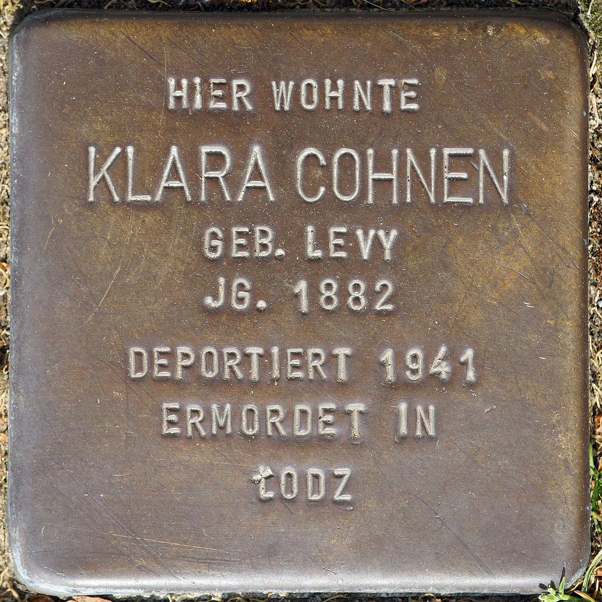 Stolpersteine MG: Cohnen, Klara